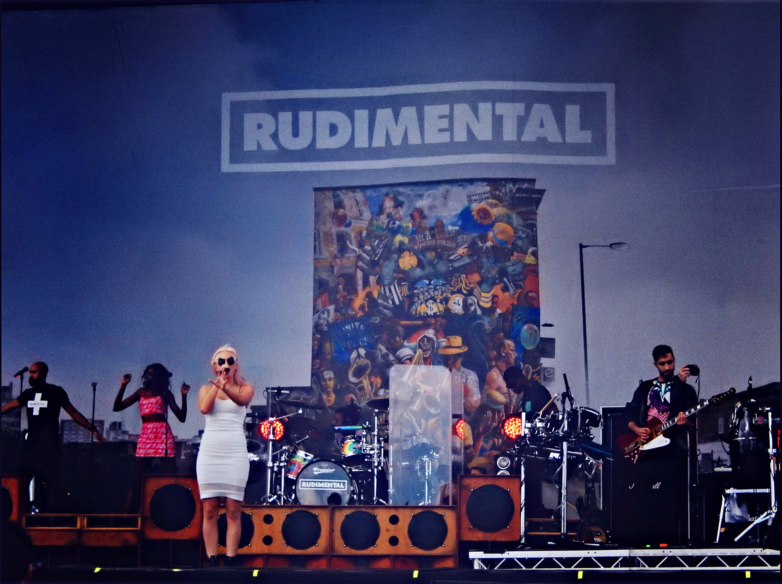 Rudimental, V Festival 2014, Chelmsford